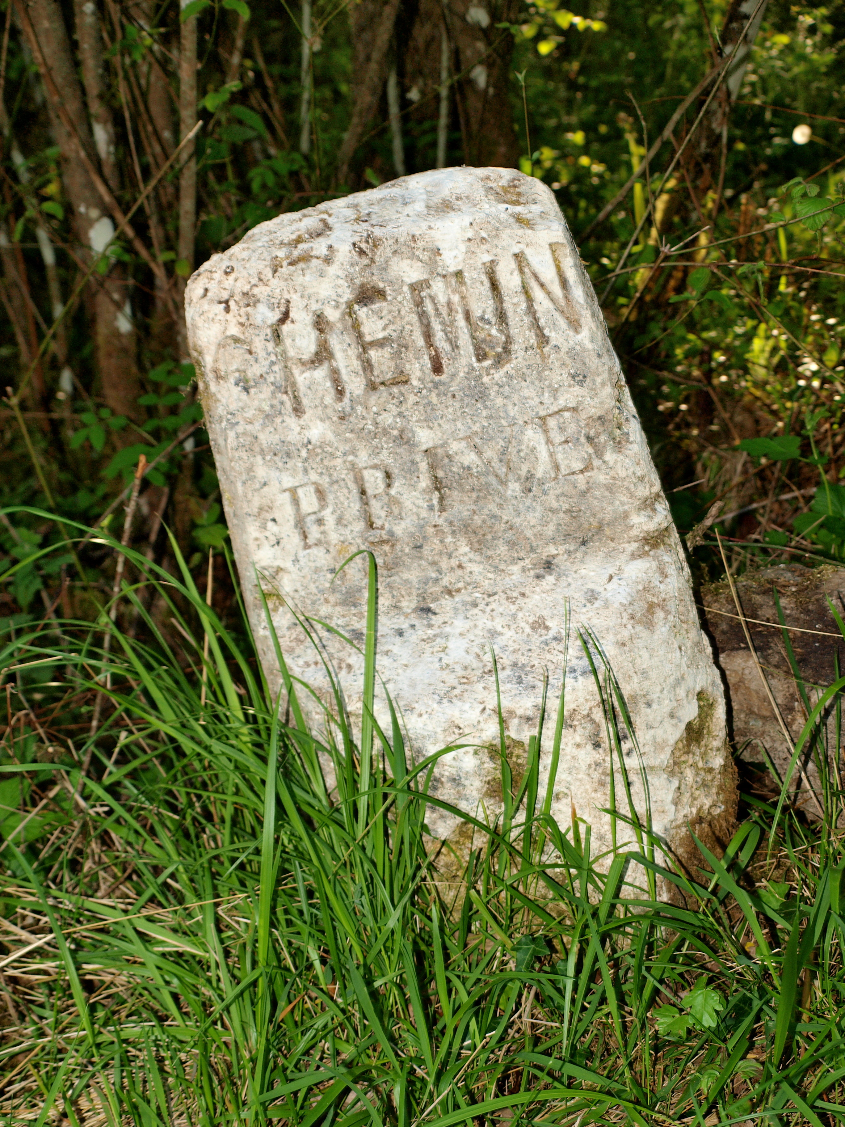 Château de Fourolles (Saint-Aubin-Château-Neuf, Yonne, France)